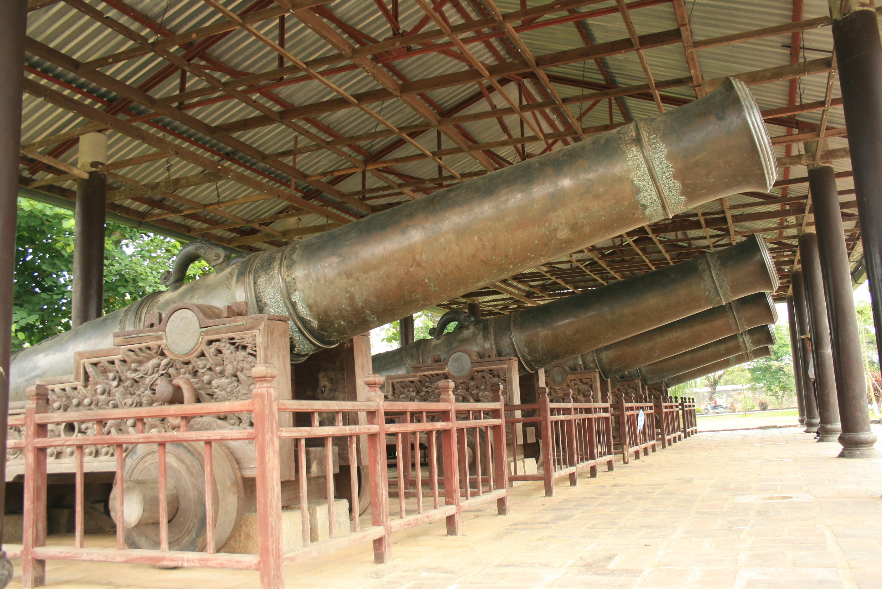 Thể loại:Di tích cố đô Huế Thể loại:Hình truyền lên bởi thành viên Lưu Ly